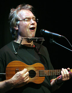 Frank Baier mit seiner Ukulele in Bochum, 2007